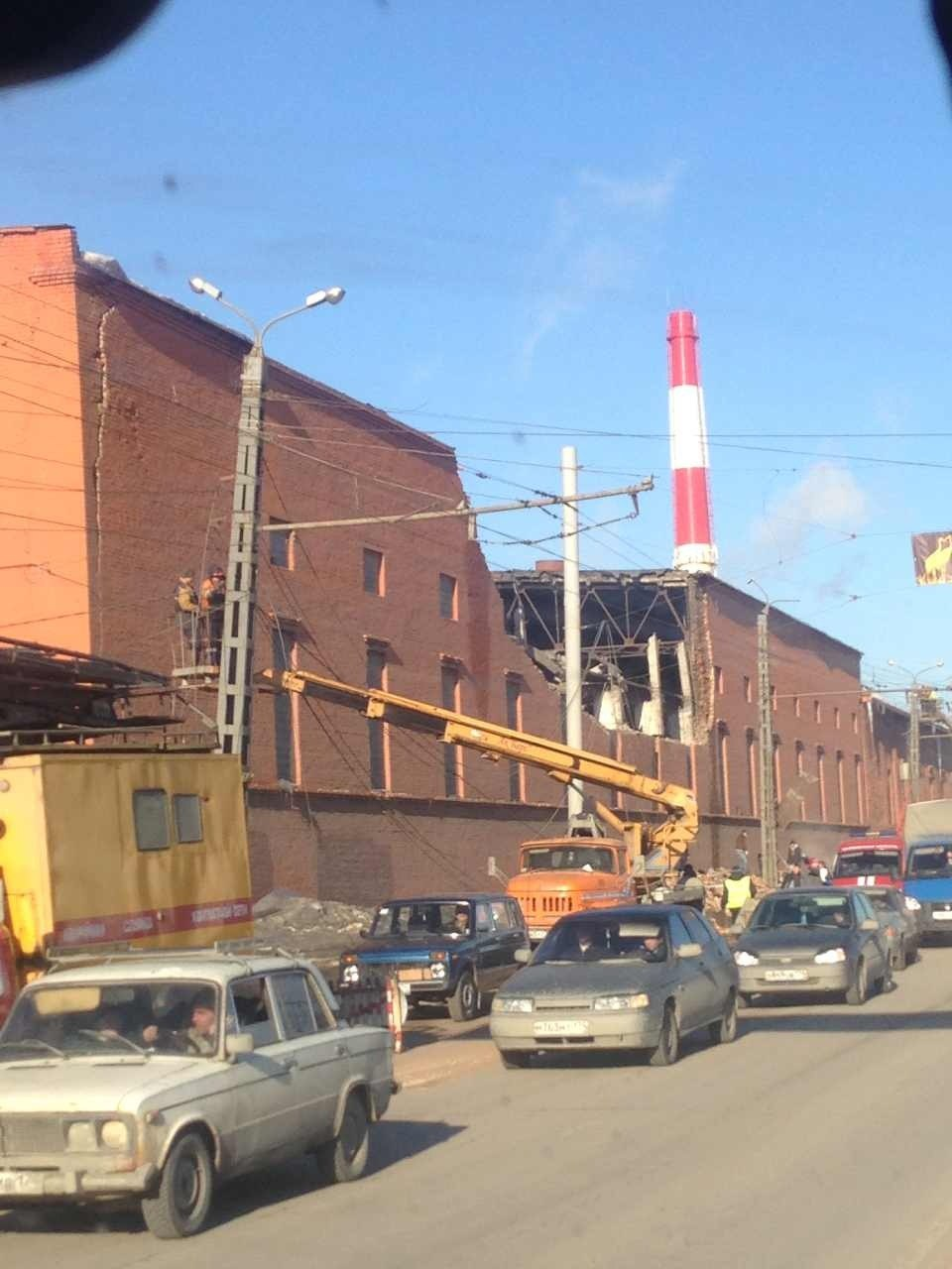 Последствия падения метеорита 15 февраля 2013 года. Цинковый завод.